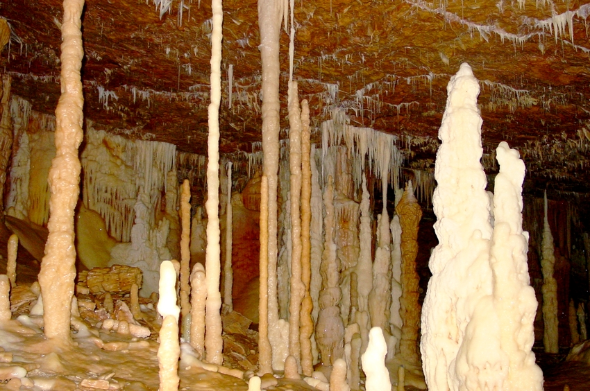 La grotte du Cirque, Commune d'Assier, département du Lot, France.